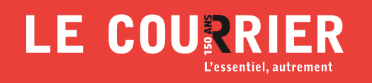 Logo du quotidien suisse Le Courrier, variante pour le 150e anniversaire du titre.